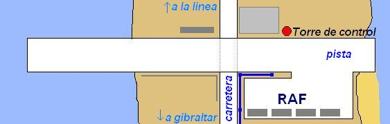 plano de Aeropuerto de Gibraltar